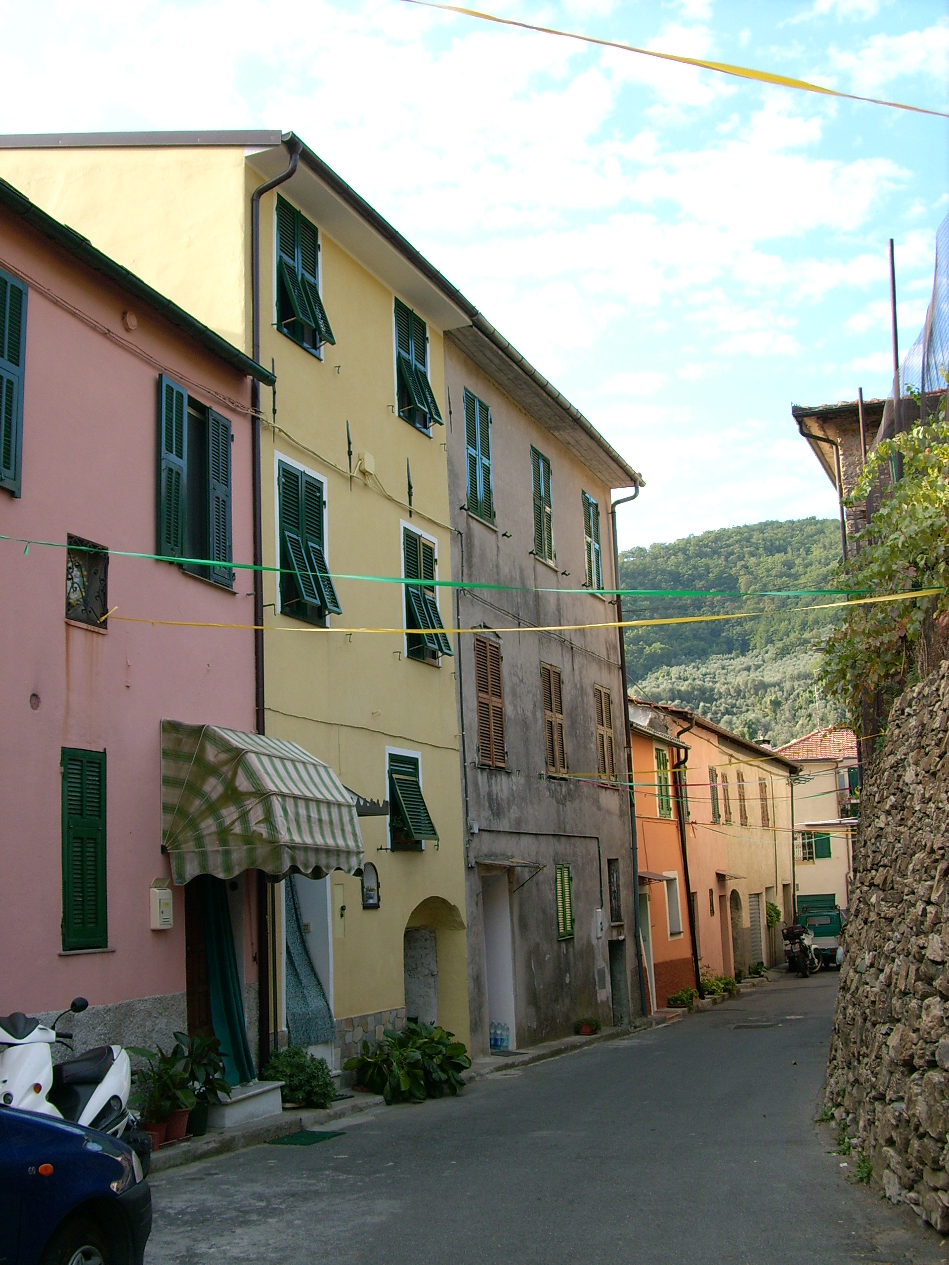 Borgoratto (Lucinasco), Liguria, Italia